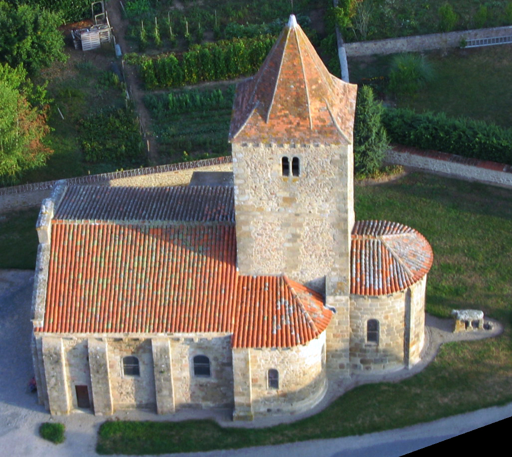 Eglise de Sainte-Thérence (Allier, Région Auvergne).